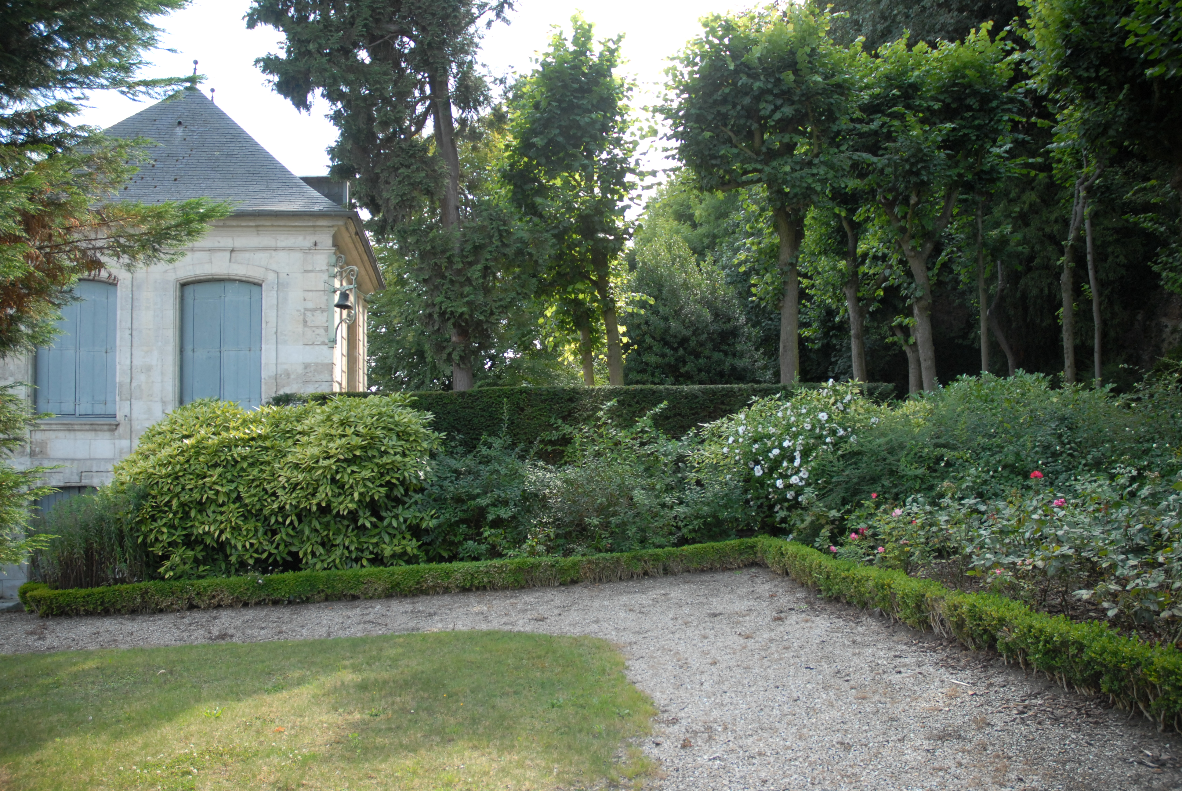 Pavillon Flaubert et son jardin à Croisset, près de Rouen.